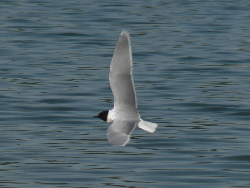 Racek malý (Larus minutus).